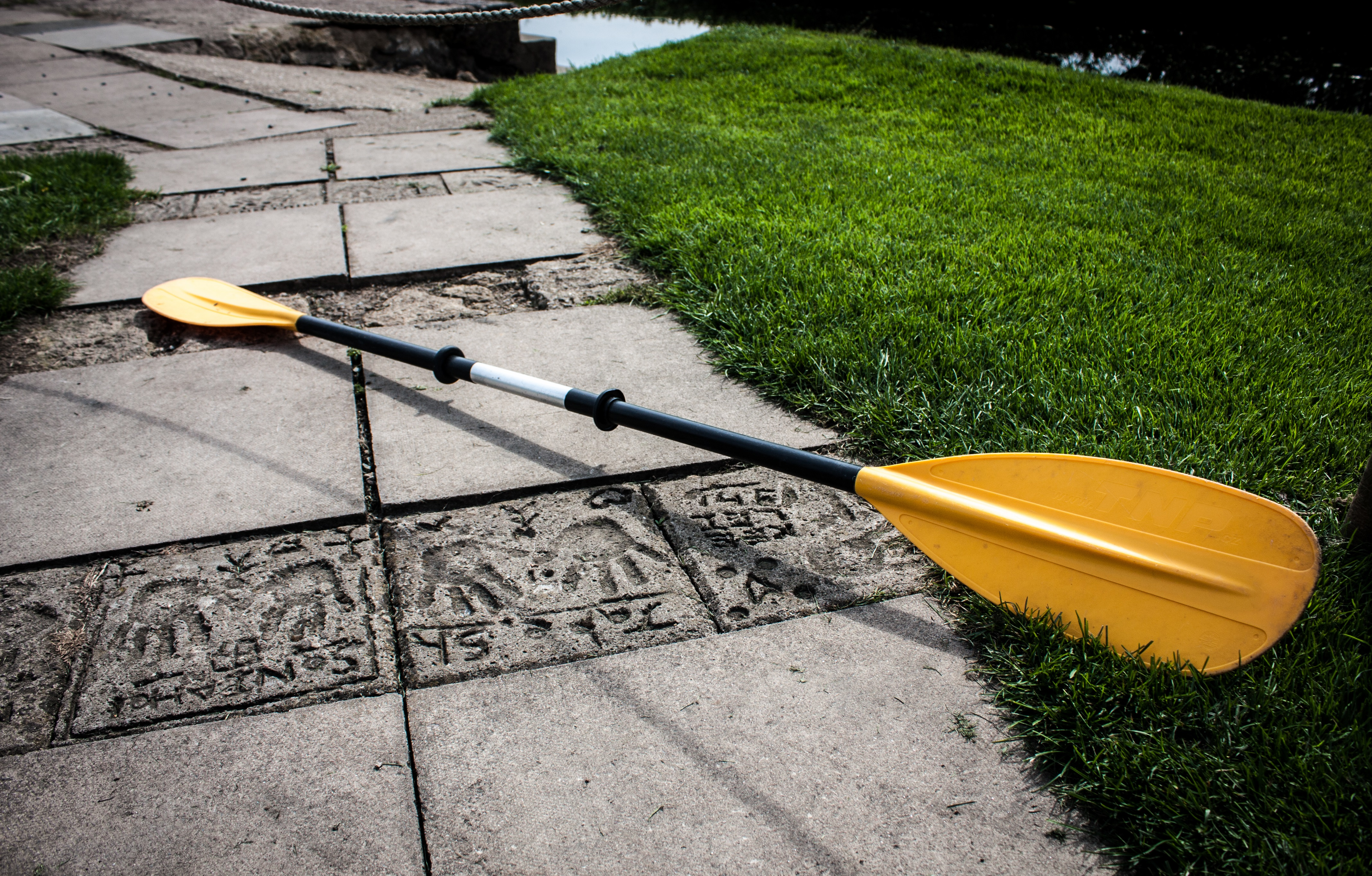 Leicester Outdoor Pursuit Centre